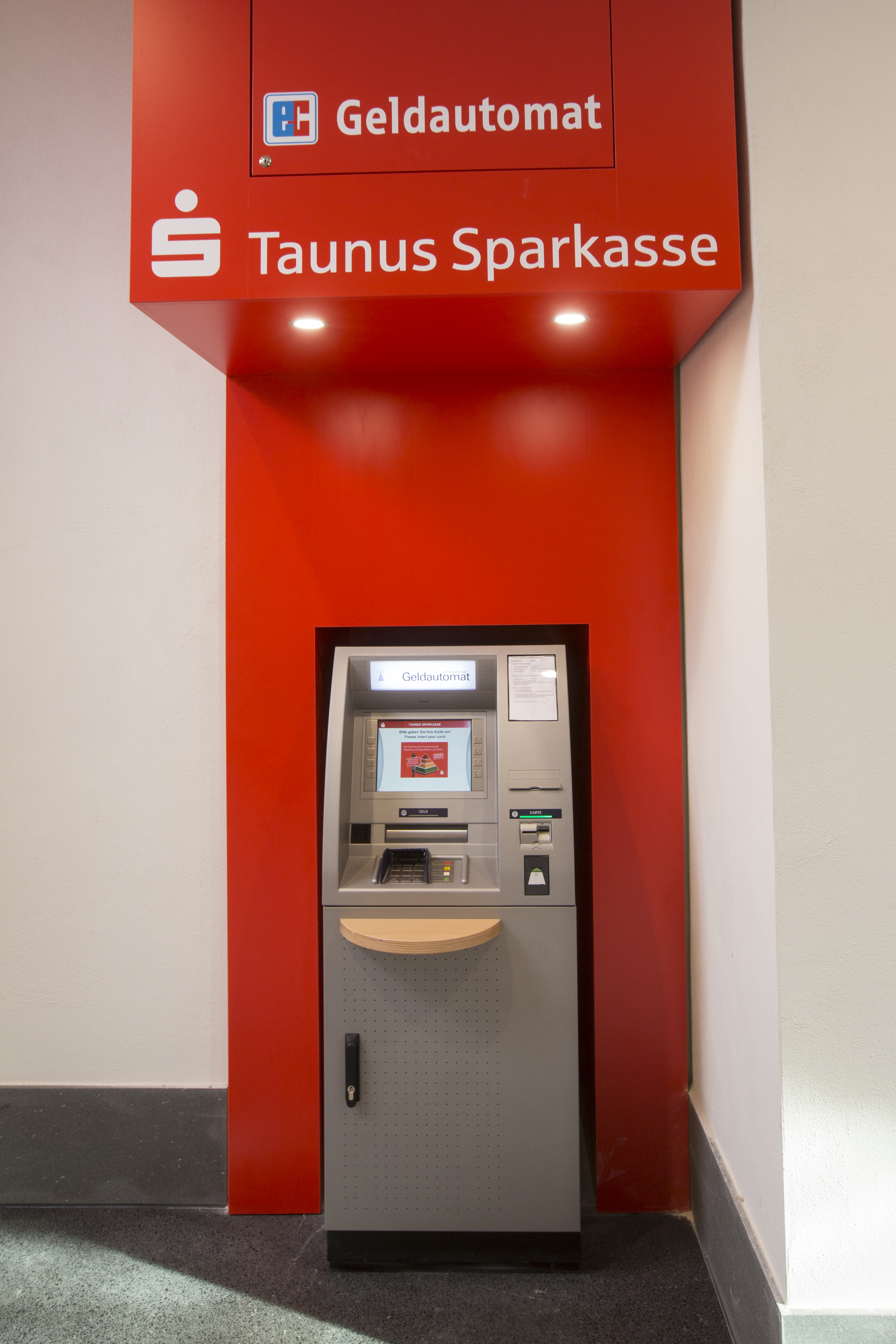 Ein Geldautomat der Taunus Sparkasse im restaurierten Bahnhof Bad Homburg.